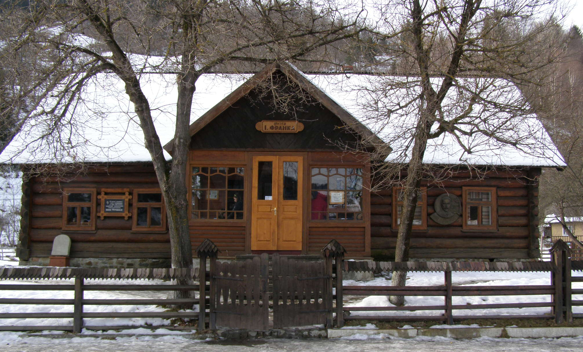 Фотографія будинку - музею Івана Франка в с. Криворівня